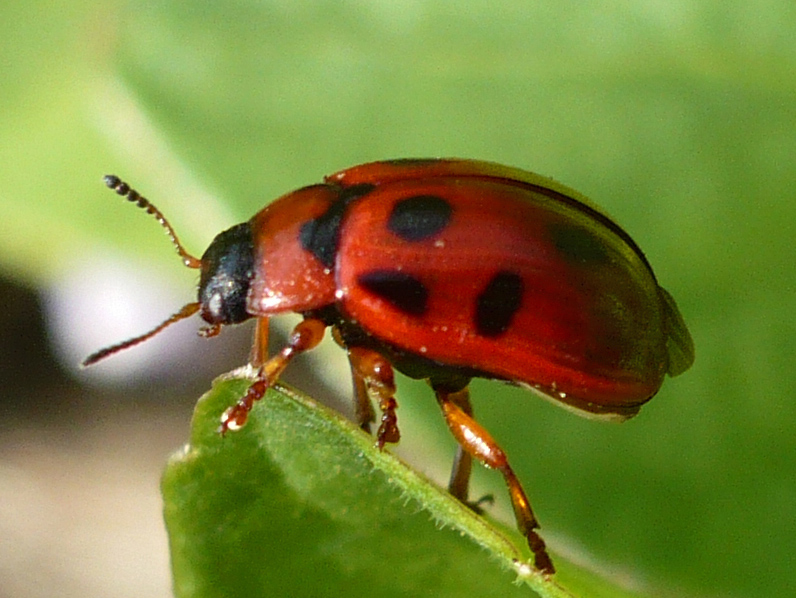 Красноногий листоед (лат. Gonioctena decemnotata). Балка Каменный Лог, Белгородская область.